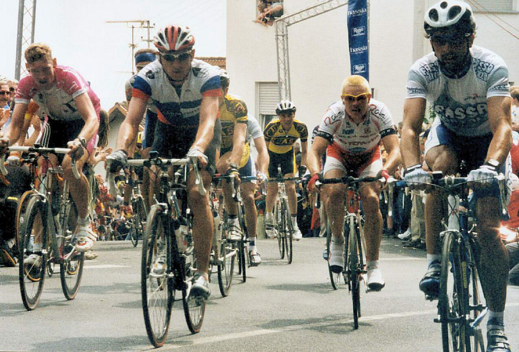 Rund um den Henninger-Turm 1. Mai 2000: Das Feld am Mammolshainer Berg.